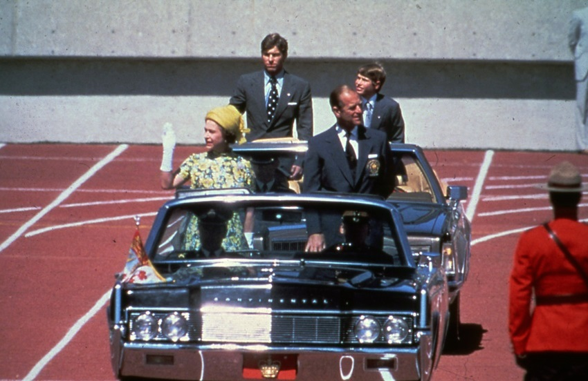 Royal motorcade